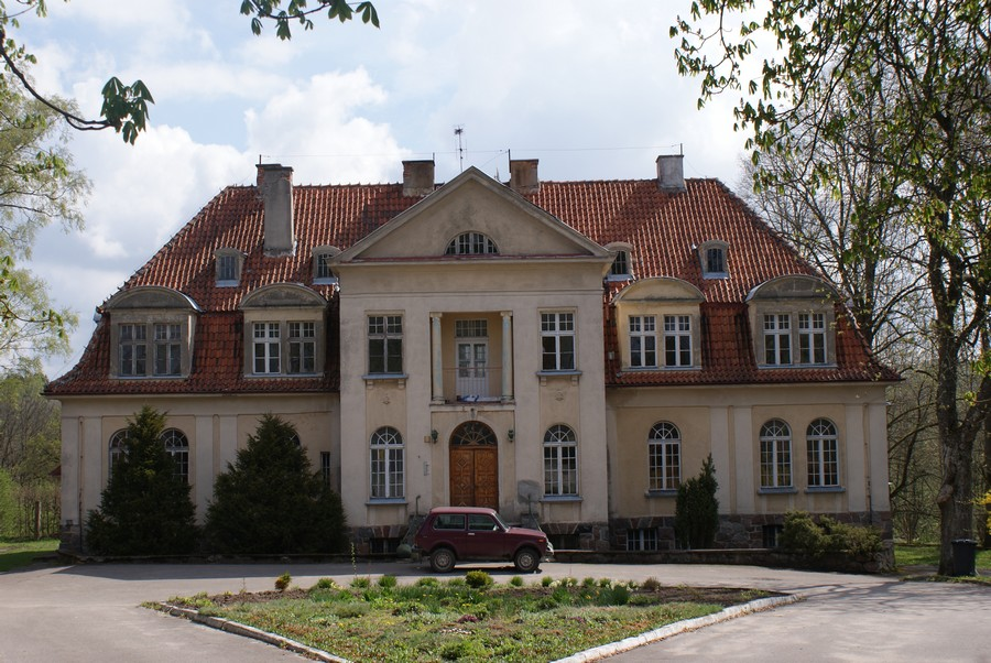 Dwór w Kłaninie